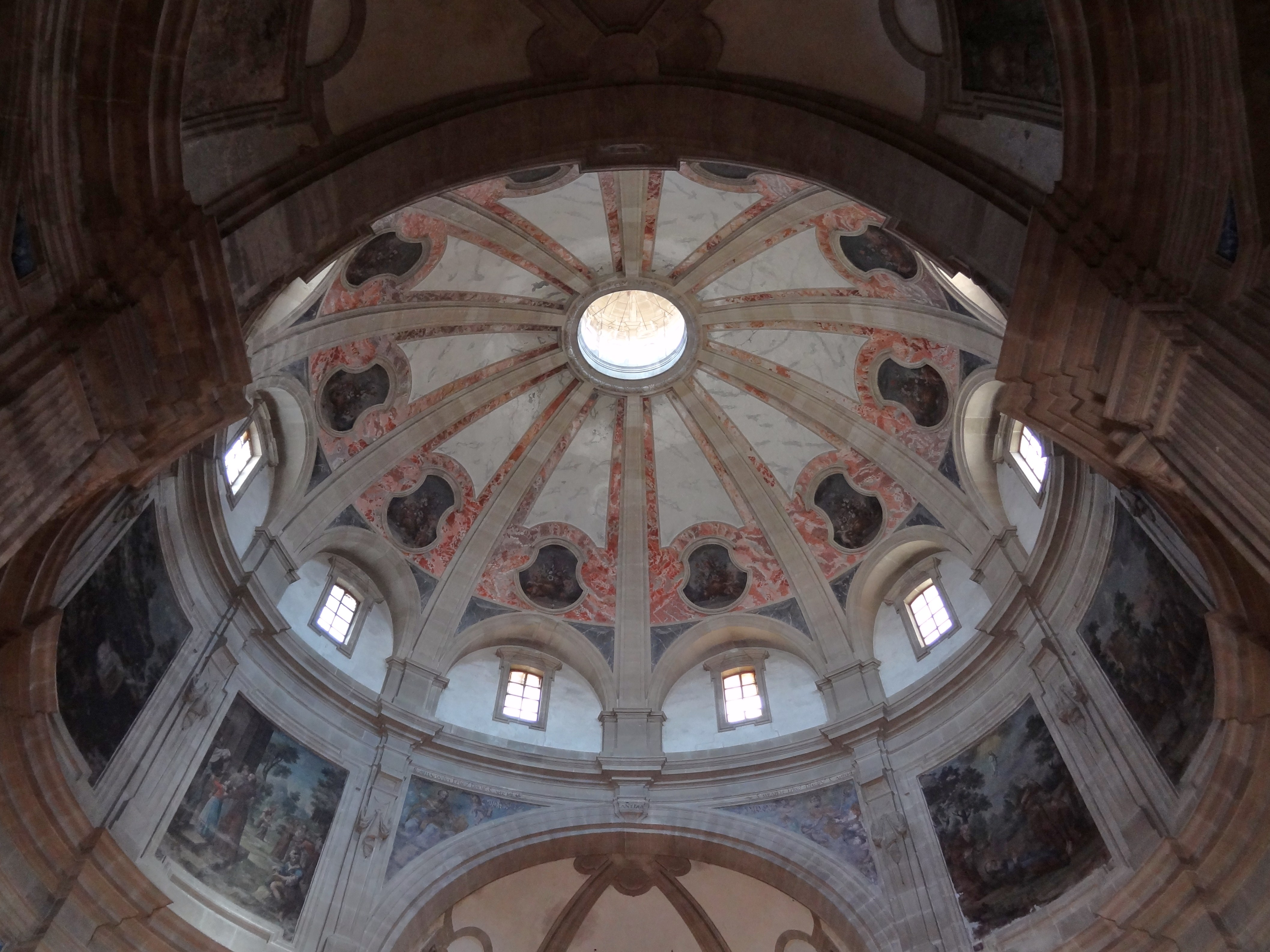 Kuppel der Kirche Sant Antoni des Viana in Palma, Mallorca, Spanien